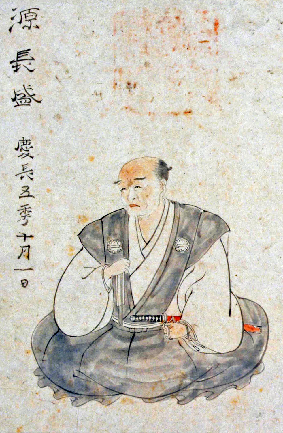 肖像集8 増田長盛